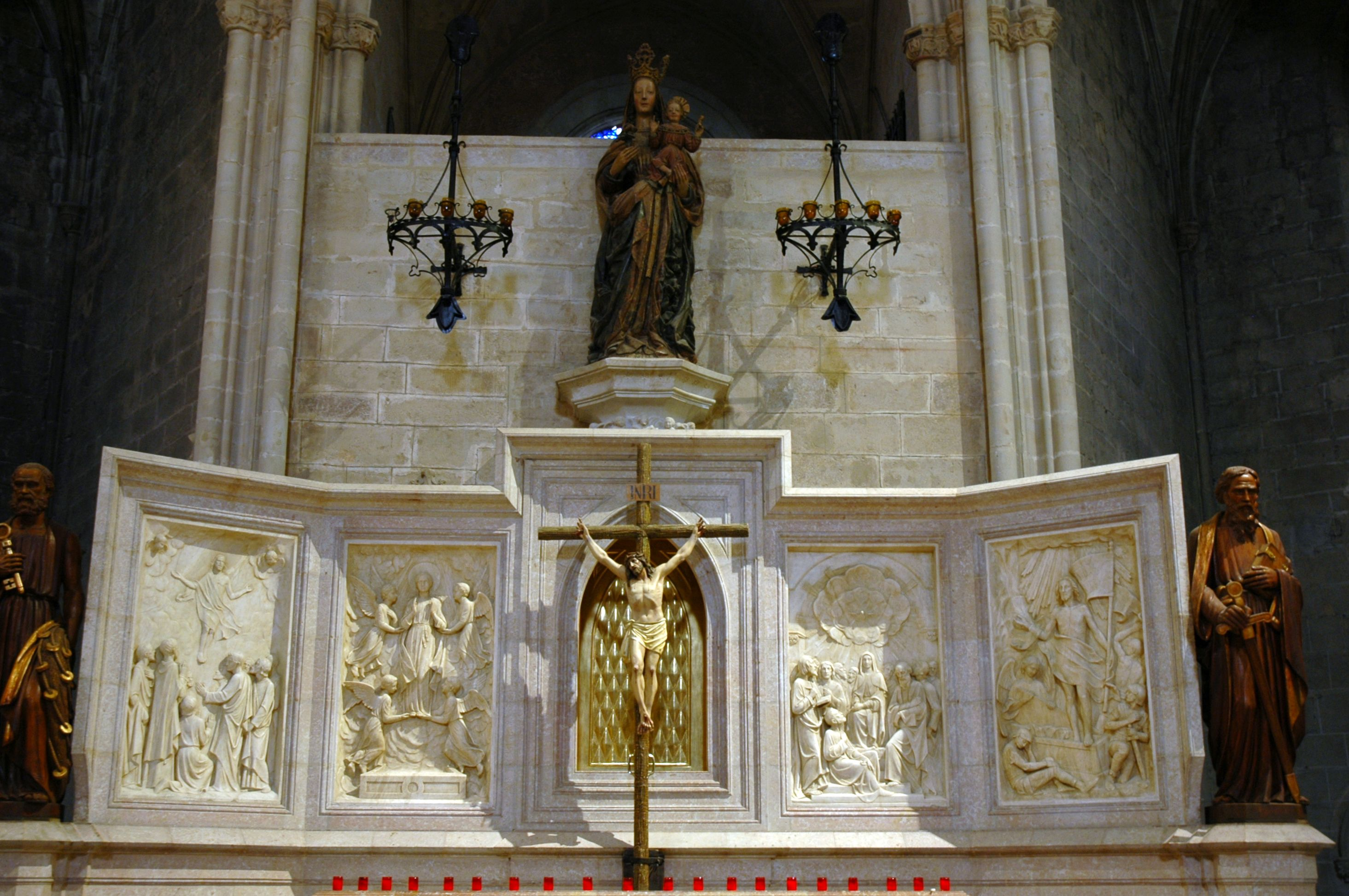 Santa Maria de Montblanc - Imatge de Santa Maria